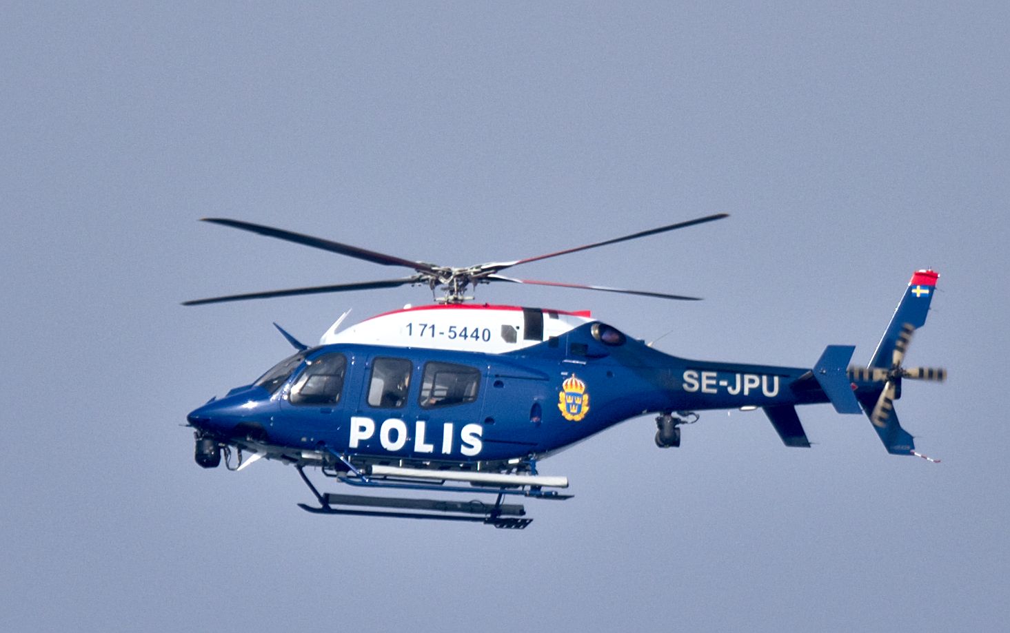 Polishelikoptern Bell 429 utanför Ornö i mars 2016.